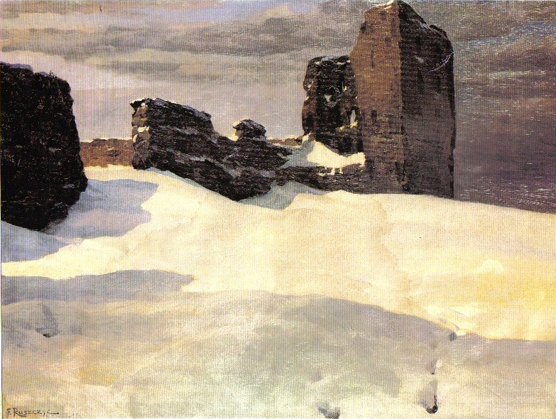 “Крэва”, 1899 г.; Уласнасць калекцыі бібліятэкі Урублеўскіх у Вільні